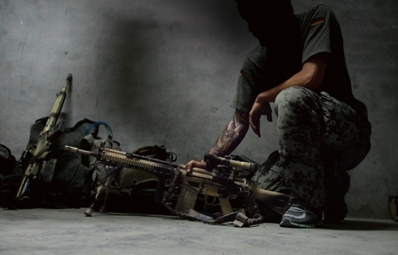 Scharfschütze in der Polizeistation in Chahar Darreh